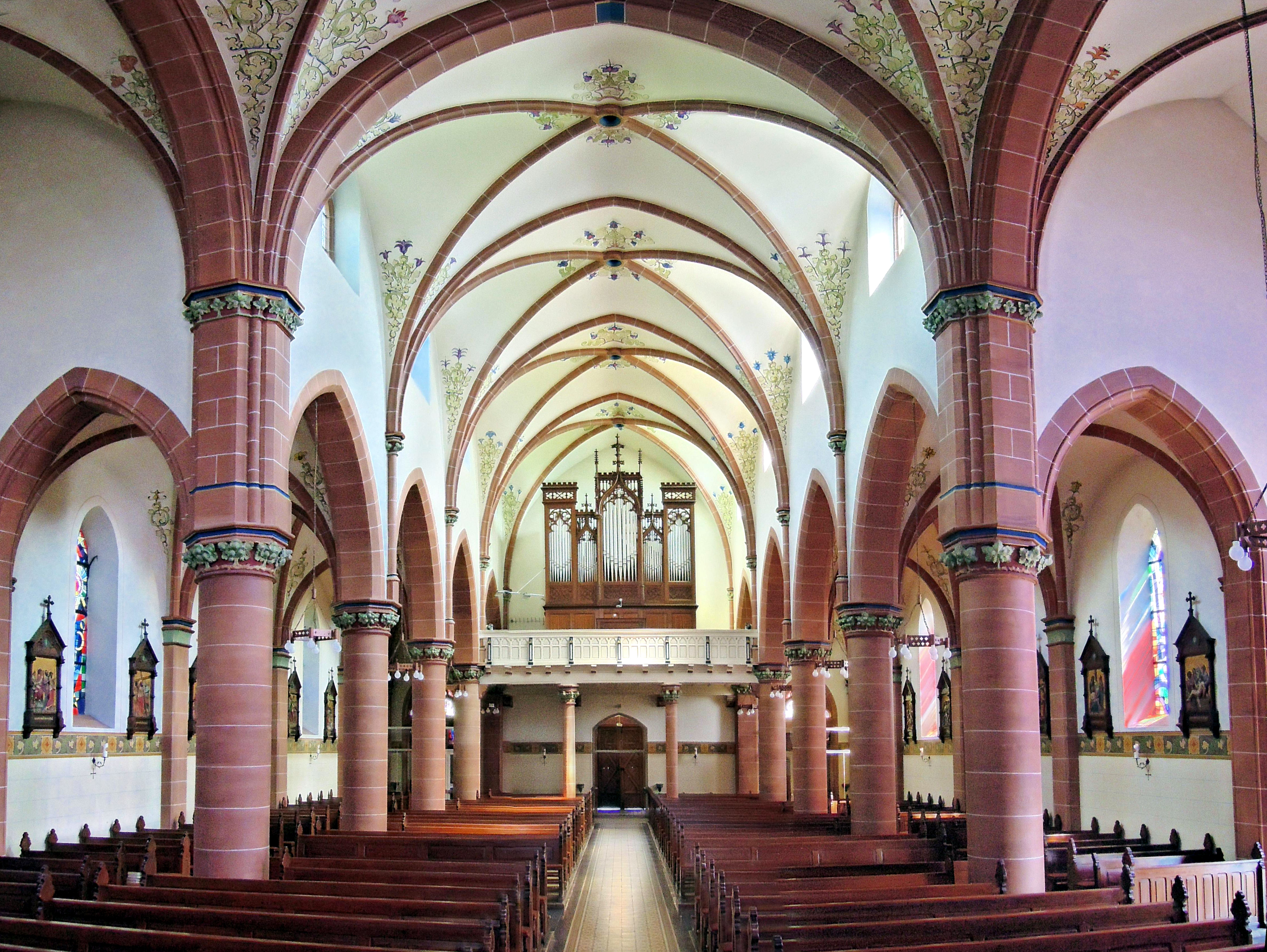 Reimsbacher Straße, kath. Pfarrkirche St. Andreas und Mariae Himmelfahrt, 1898–1901 von Wilhelm Hector (Einzeldenkmal)